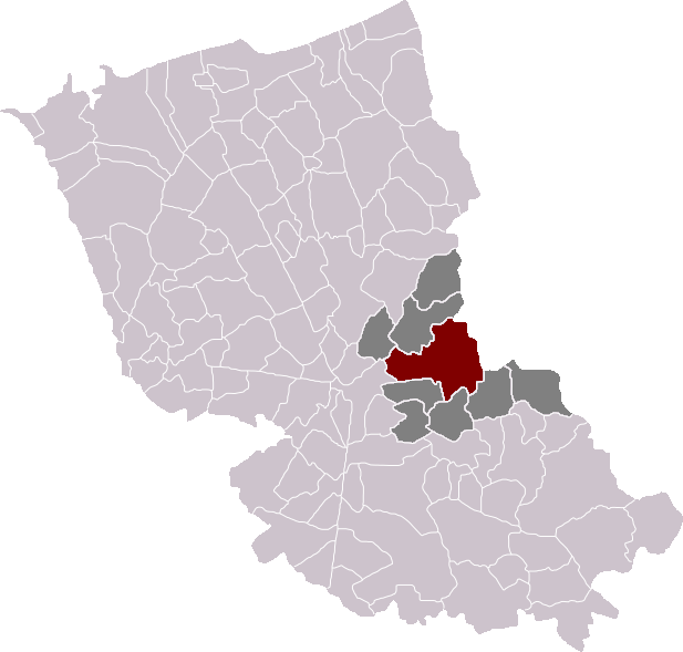 Locatie gemeente Steenvoorde in arrondissement Duinkerke. Zelfgemaakt. Location of Steenvoorde municipality in the arrondissement of Dunkirk. Self made. Localisation de la commune de Steenvoorde dans l'arrondissement de Dunkerque. Fait moi-même.